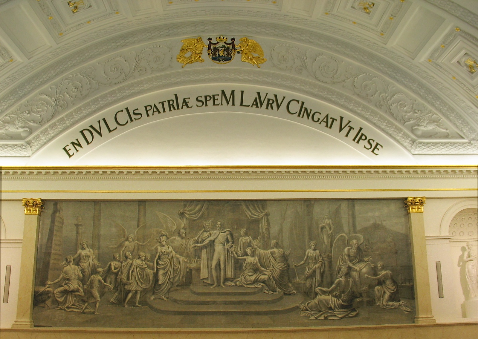 Liège University Belgium - Wandfresko 1824 von Alexandre Rifflaert, in der Aula der Universität Lüttich, mit dem Wappen Wilhelm I. Niederlande.